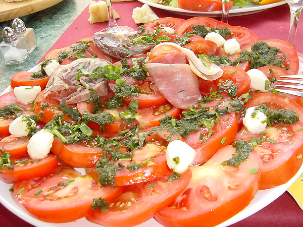 Salade de tomates à Villeneuve-les-Avignon